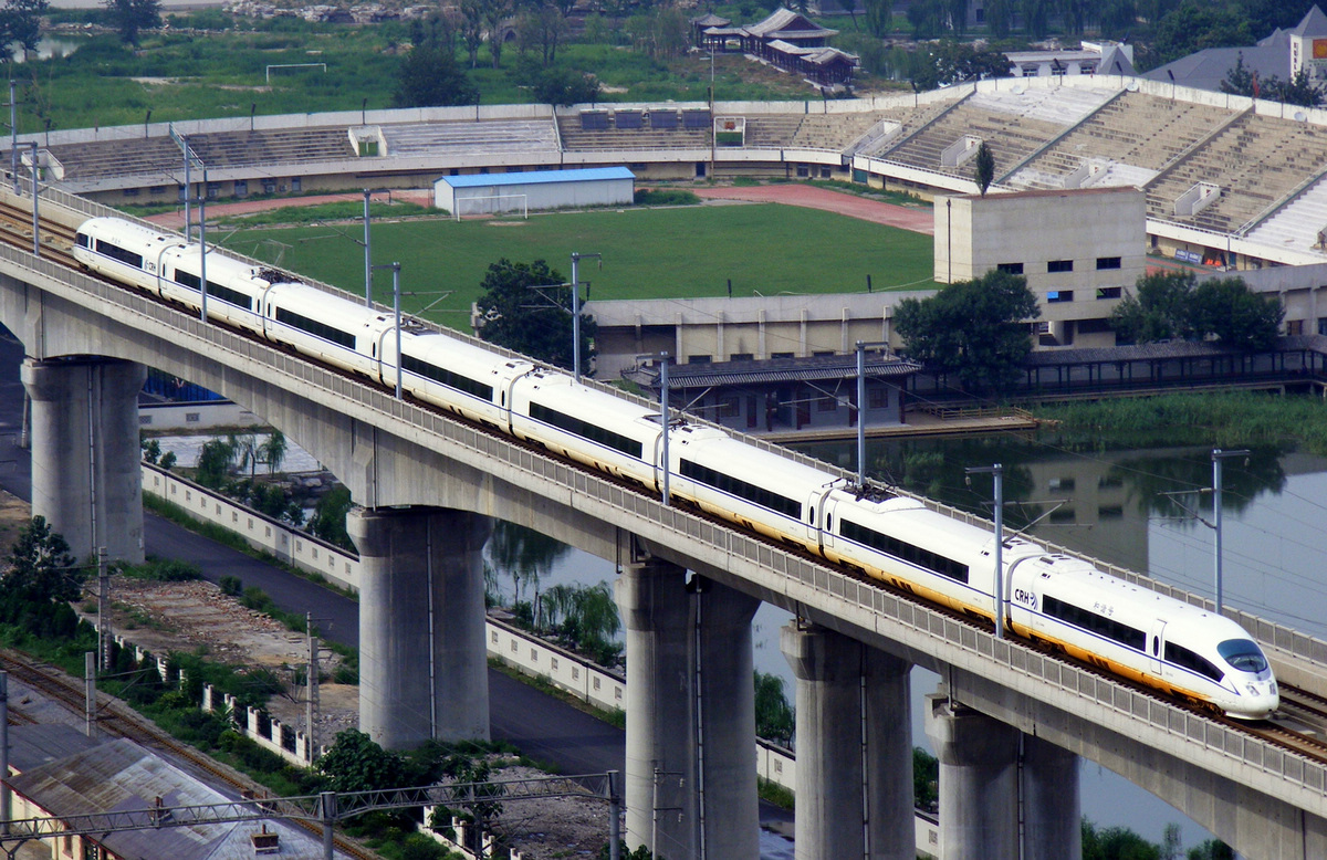 京津城际铁路-天津北站上方